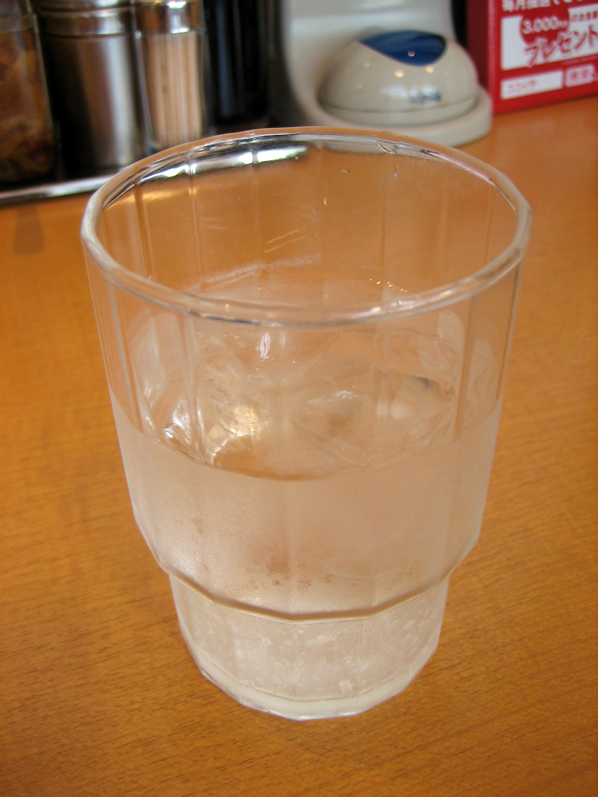 カレーハウス CoCo壱番屋にて提供される飲み水。